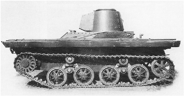 Czołg pływający PZInż 130.